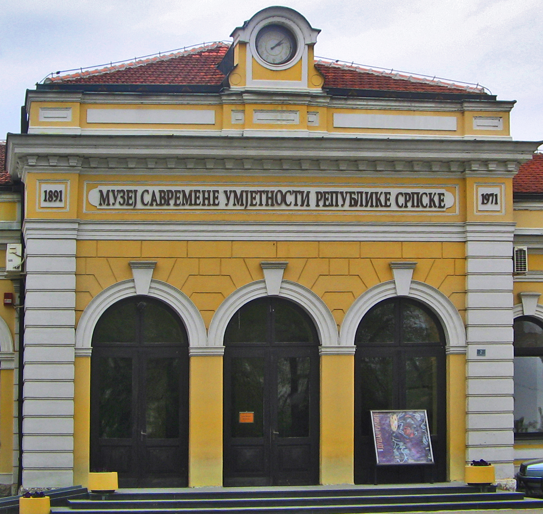 Музеј савремене умјетности Република Српска